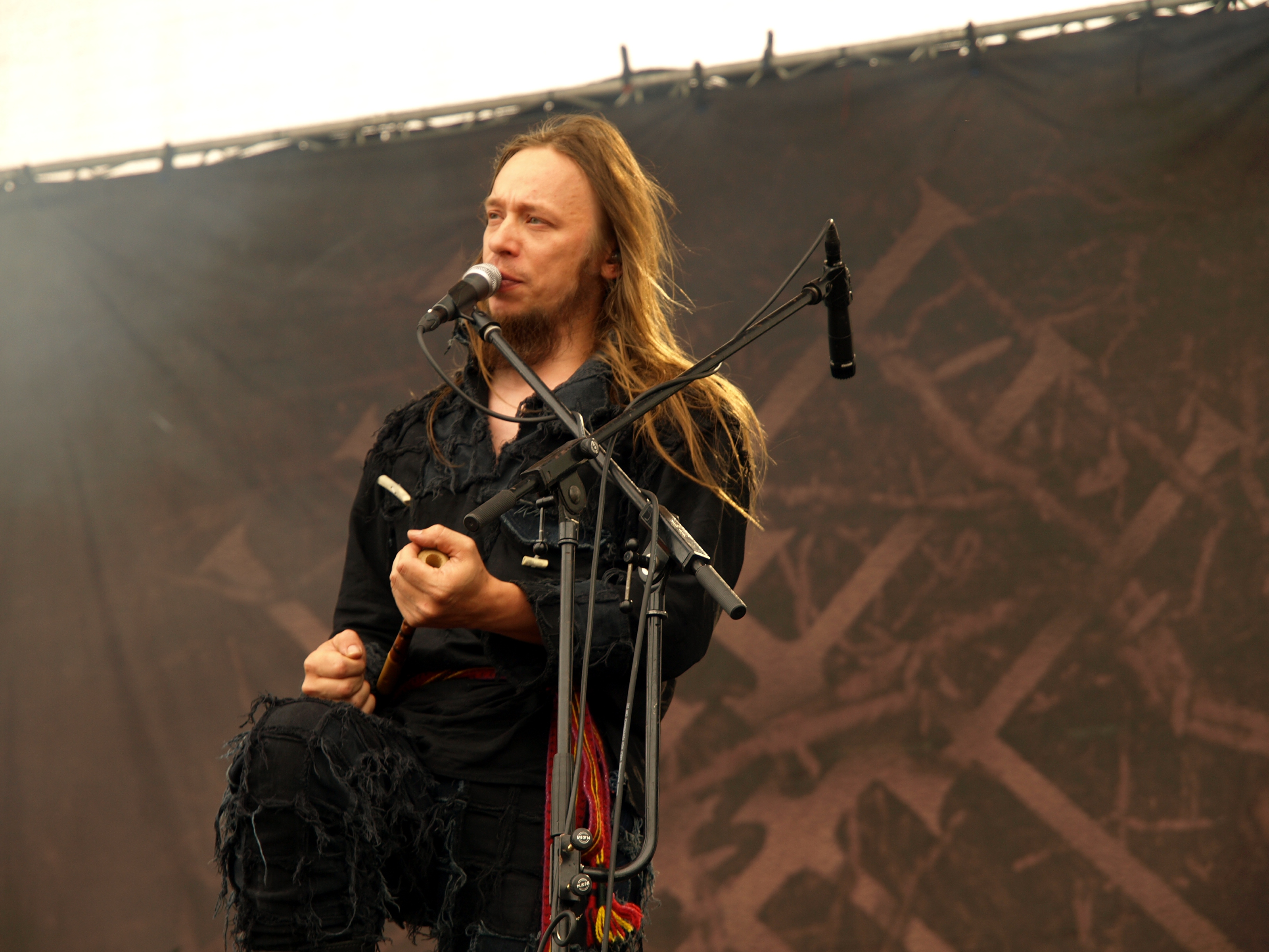 Metsatöll live am Myötätuulirock 2011